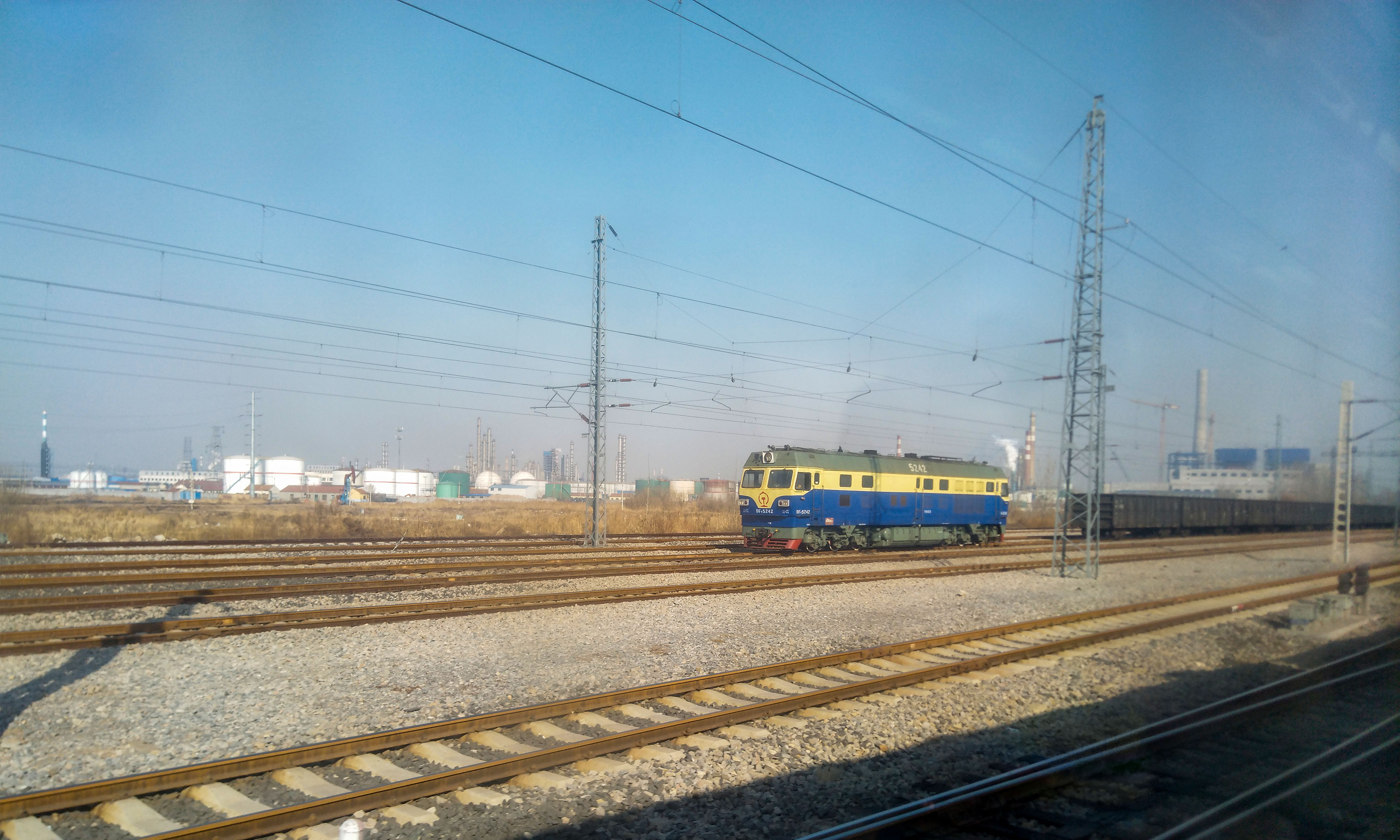 淄东铁路史口站